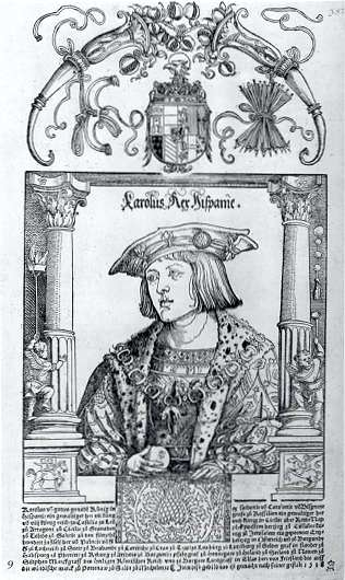 Kaiser Karl V. als König von Spanien